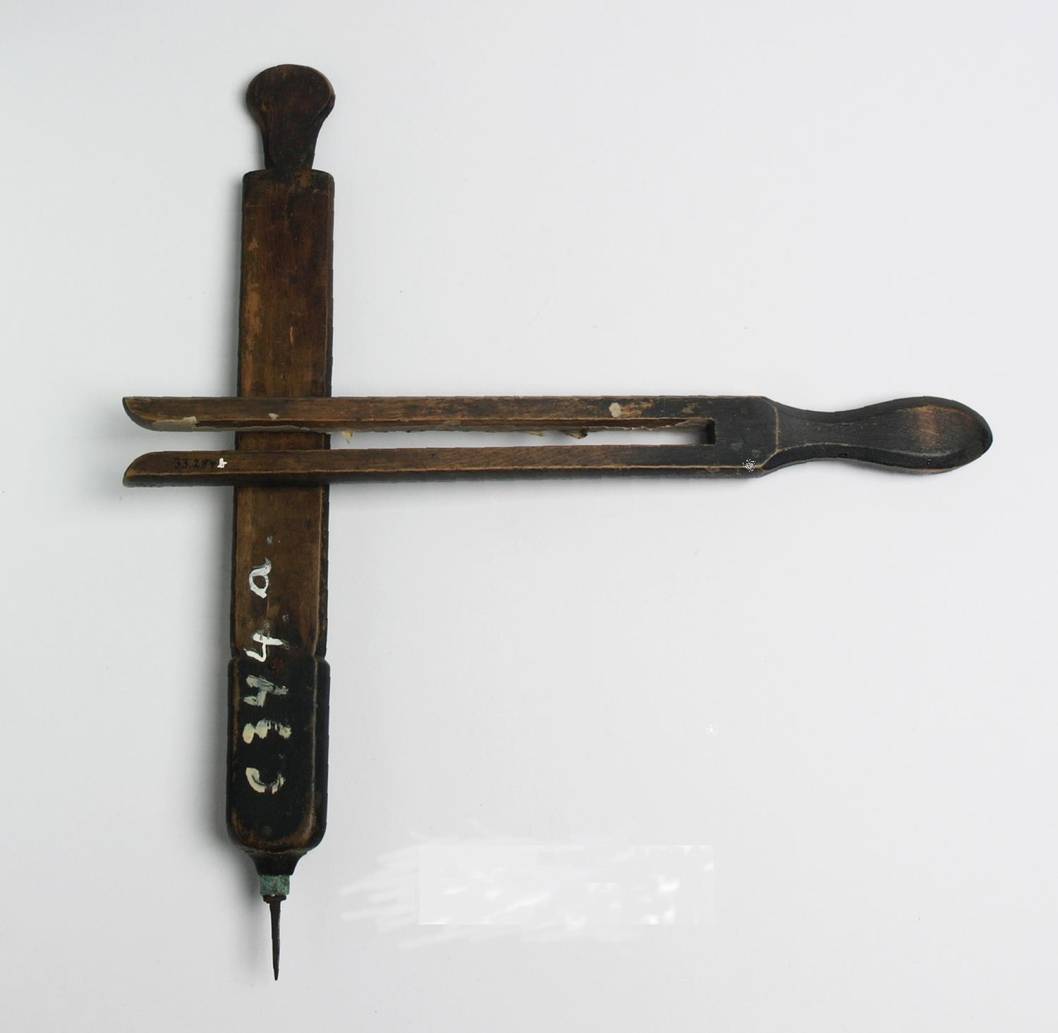 Manuskripthalter. Aus zwei Teilen bestehendes Gerät des Buchdruckers zum Befestigen des Manuskripts beim Handsatz. Auf dem an den Rand des Setzkastens gespießten Tenakel befestigt der Handsetzer die Manuskriptseite so mit Hilfe des gabelförmigen Divisoriums, daß er die zu setzende Zeile beim Aufreihen der Typen in der Druckzeile leicht im Auge behalten kann.Mitte 19.Jahrhundert, Focke-Museum Bremen.